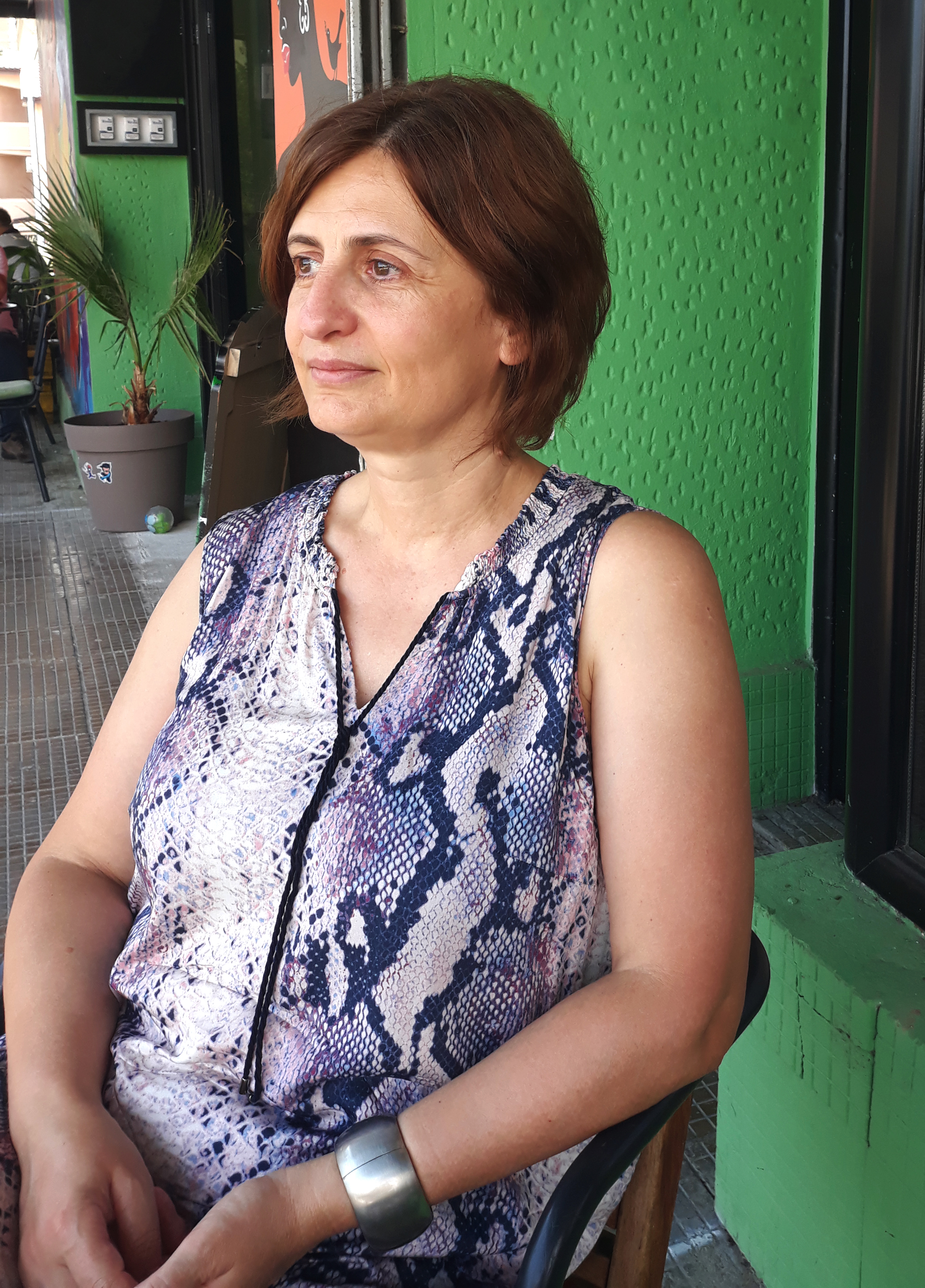 Фотографија